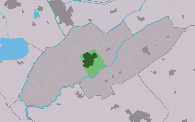 Kaartsje fan himrik fan Wolvegea